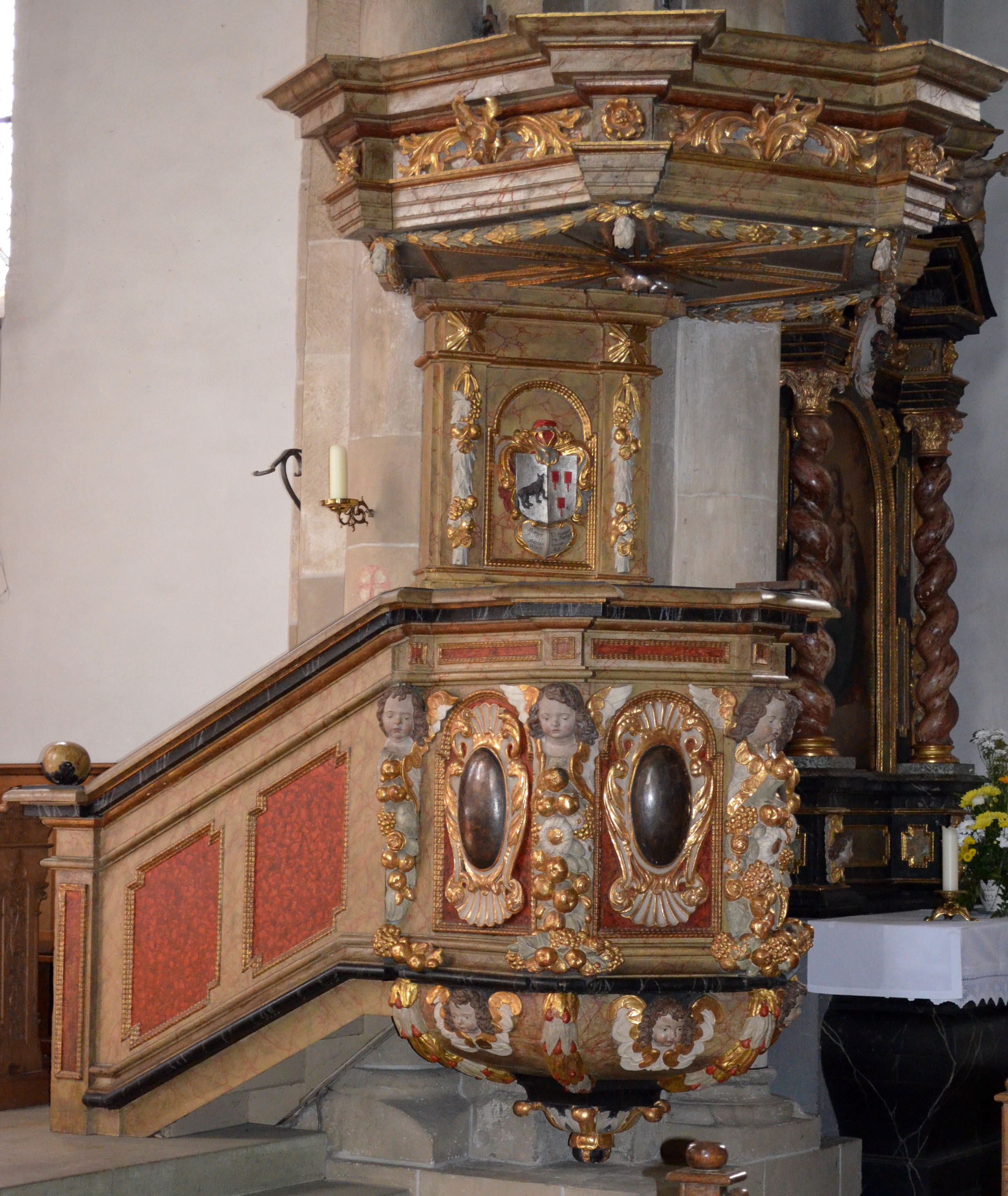 Rüthen Nikolauskirche Kanzel